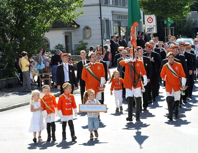 Die AV Fryburgia an der GV in Sursee.